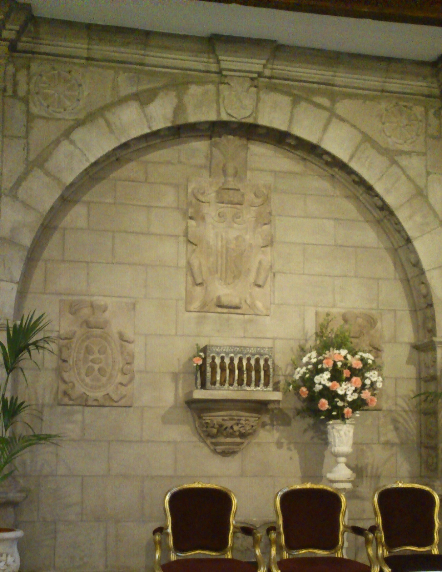 Arco de la capilla hornacina de San Pedro Apóstol con escudos pertenecientes a la capilla de Santiago de la iglesia de Santa Catalina. En 1971 fueron reubicados en la iglesia parroquial de Fuenllana. Foto: Proyecto Arqueológico 'Santa Catalina'.